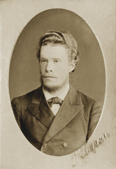 Jüri Truusmann